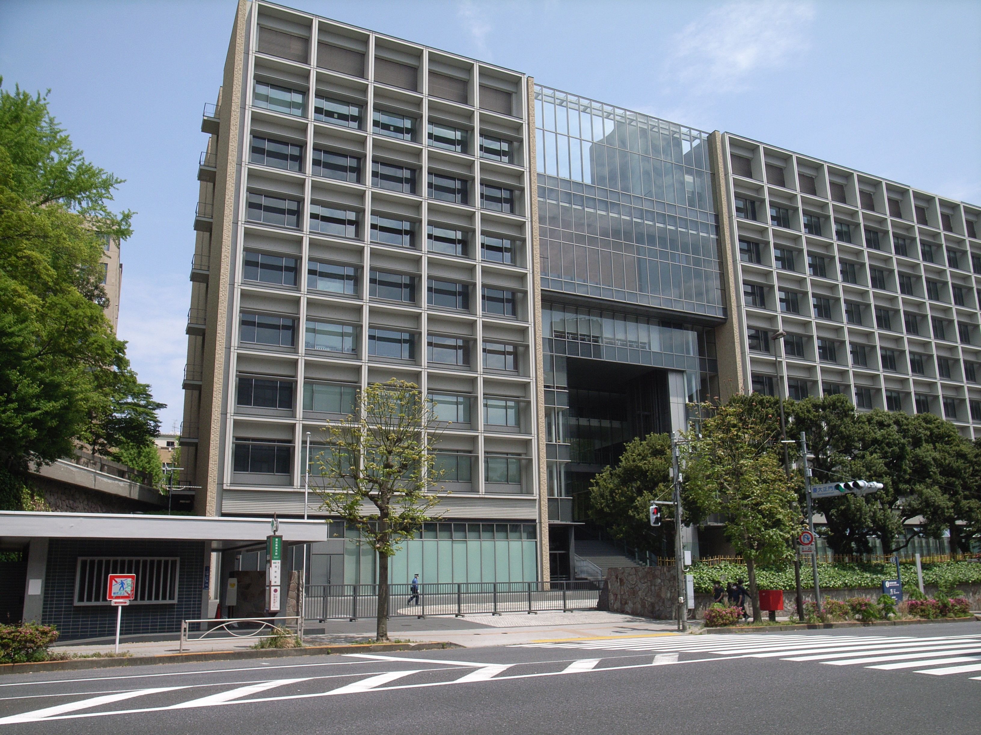 新型コロナウイルスで休校中の慶応義塾大学。